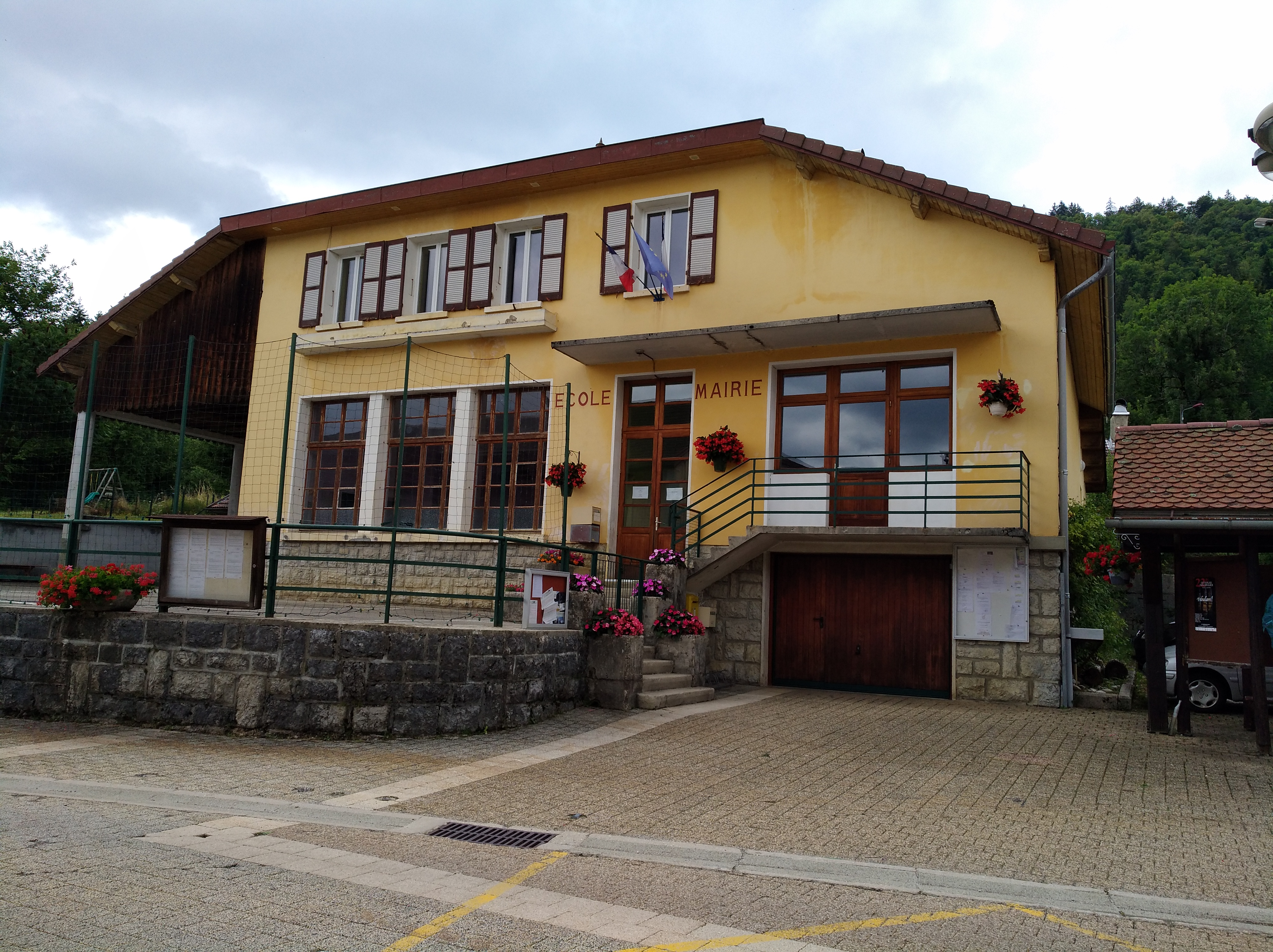 Mairie-école de La Rixouse (Jura, France).